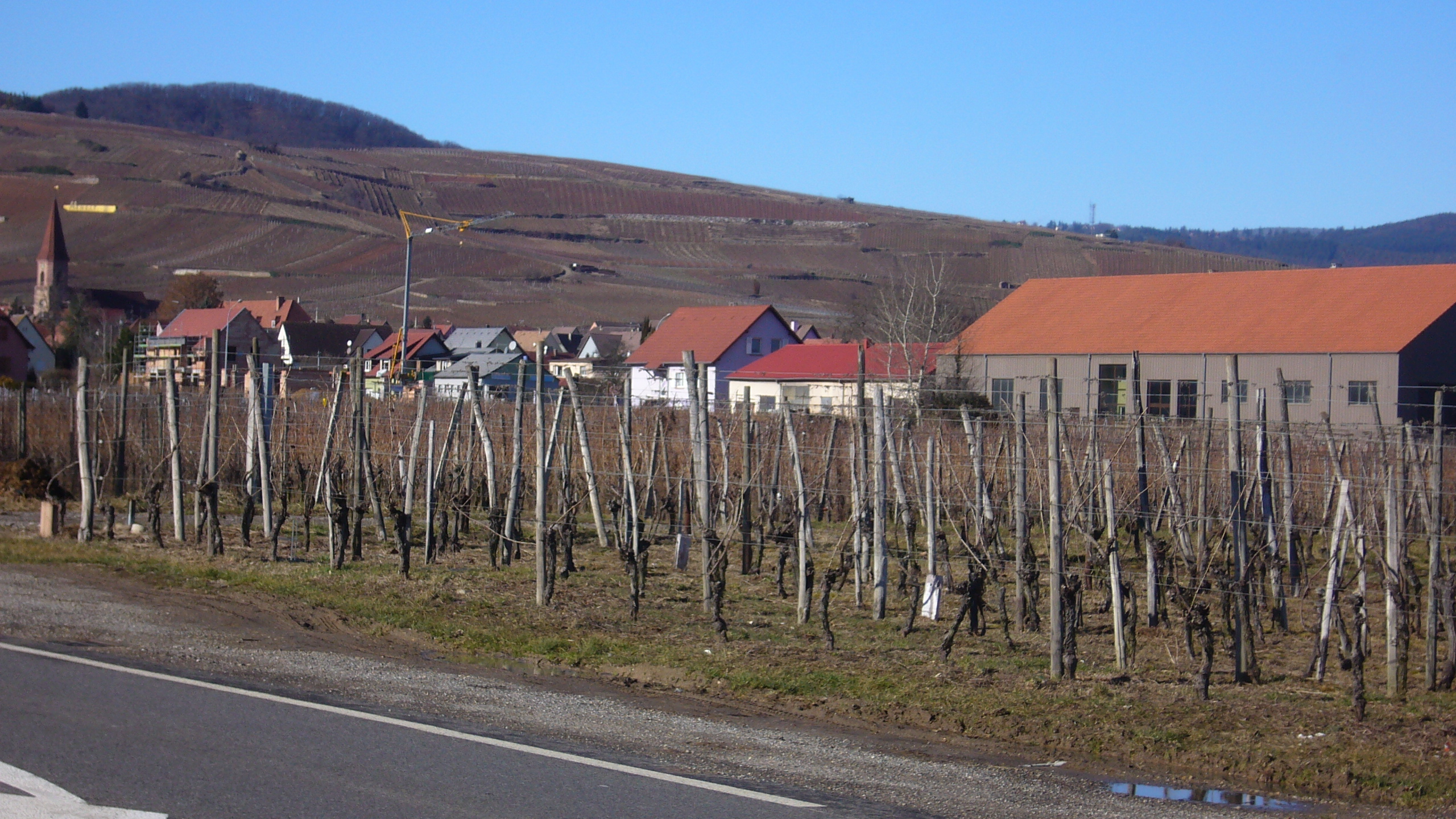 L'entrée du village de Wettolsheim, Haut-Rhin